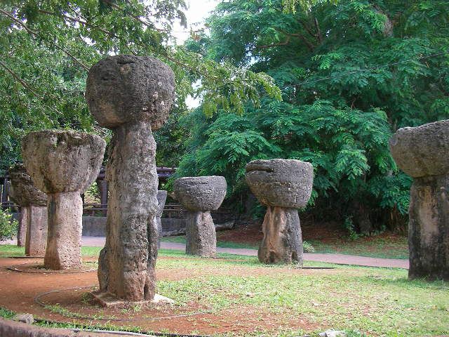 Latte stones in Latte Stone Park, Hagatna, Guam